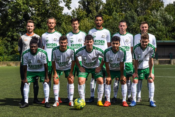 VK Linge